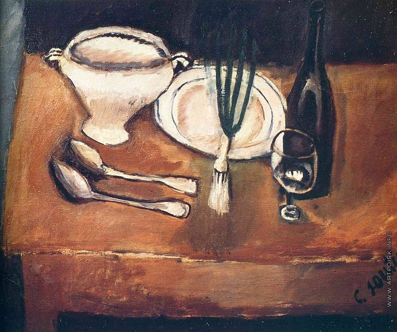 Натюрморт с луком. 1916.